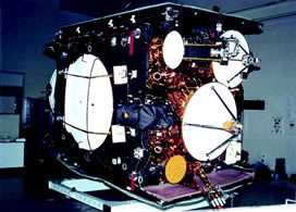 आविष्कार